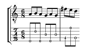 Extrait de Canarios de Gaspard Sanz en tablature et partition pour illustrer l'effet de campanella/Abstract from Gaspard Sanz' Canarios whith tab and score can illustrate campanella effect